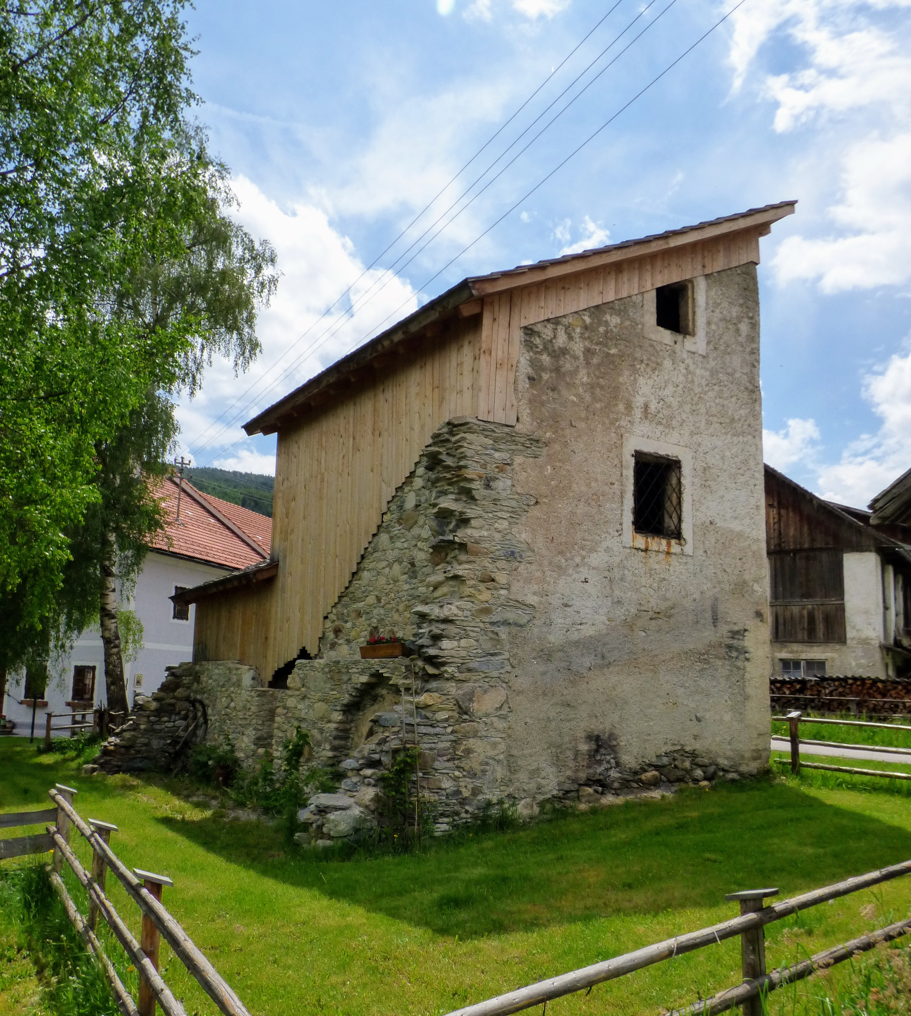 Ansitz Gröbendorf (Gde. Mariapfarr)